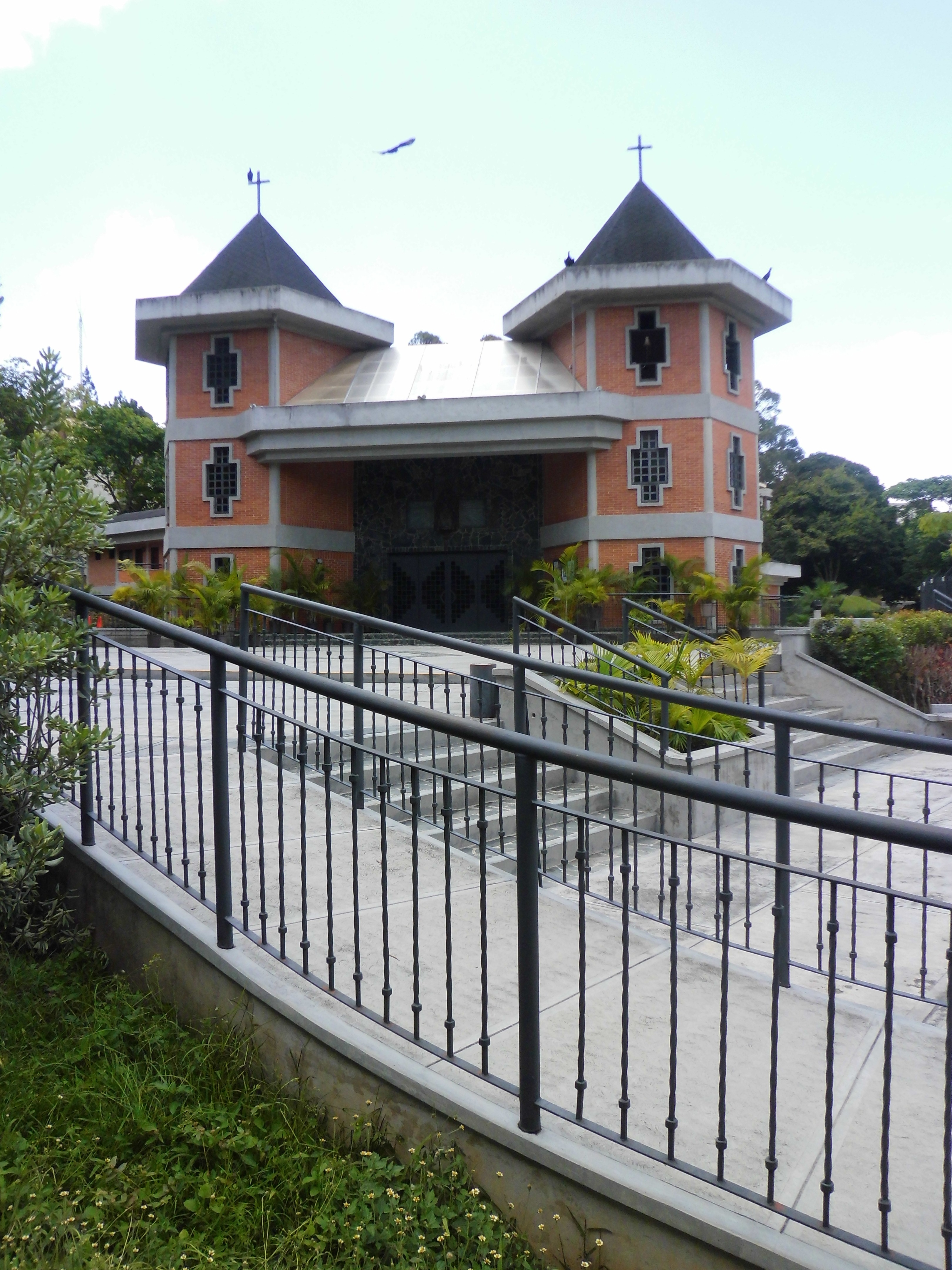 Capilla de Santa Ana - La Lagunita, municipio El Hatillo, estado Miranda - Venezuela.